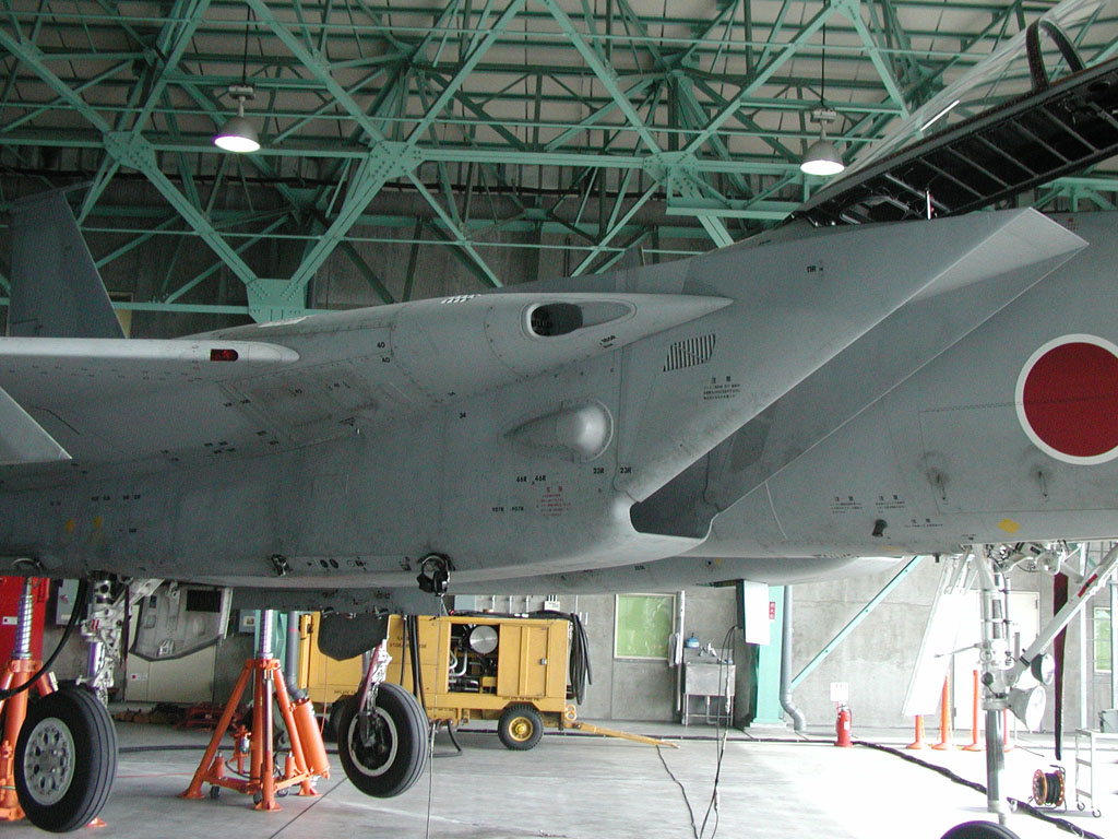 F-15J改修第二形態 (#942)。2008年の岐阜基地航空祭にて。